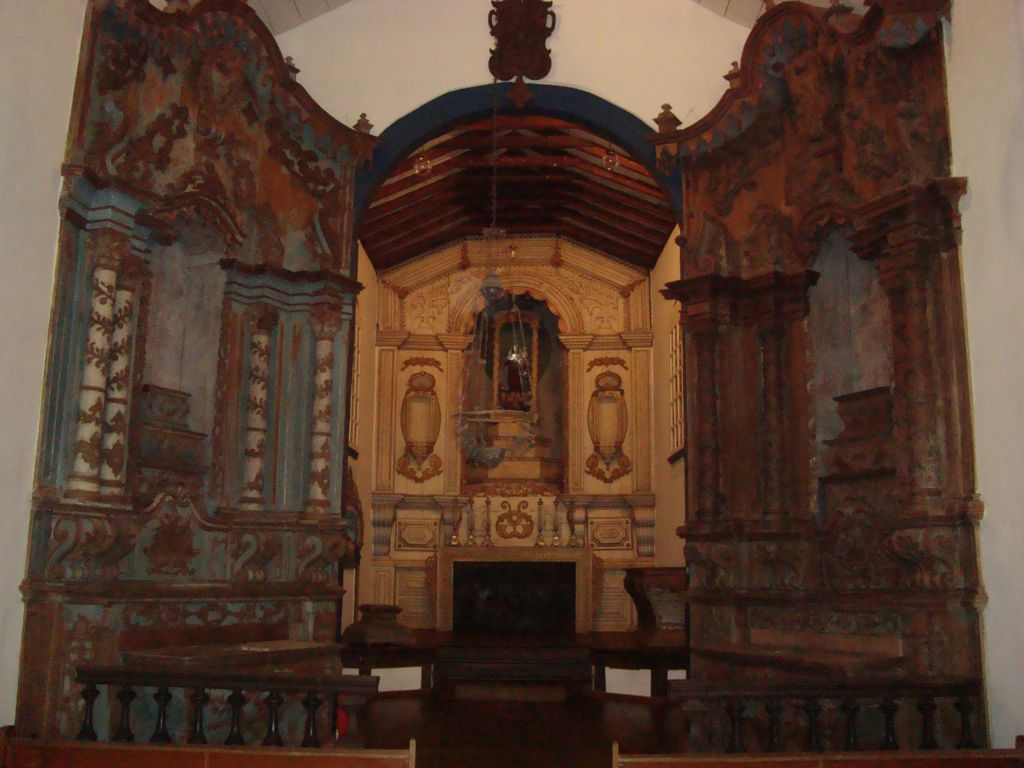 Interior da Igreja do Carmo, Pirenópolis, Brasil.